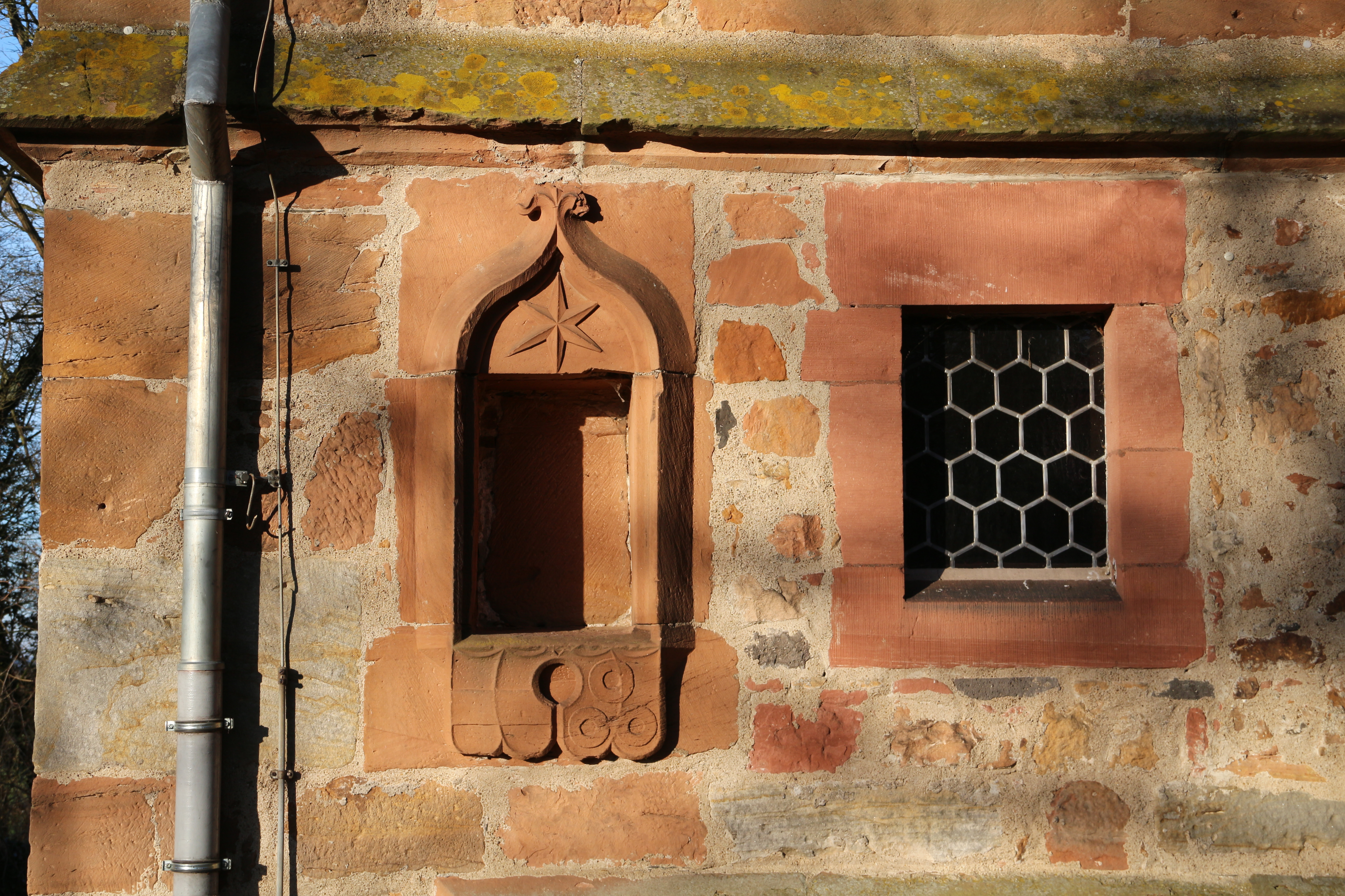 Evangelische Kirche Kirchberg (Lahn)